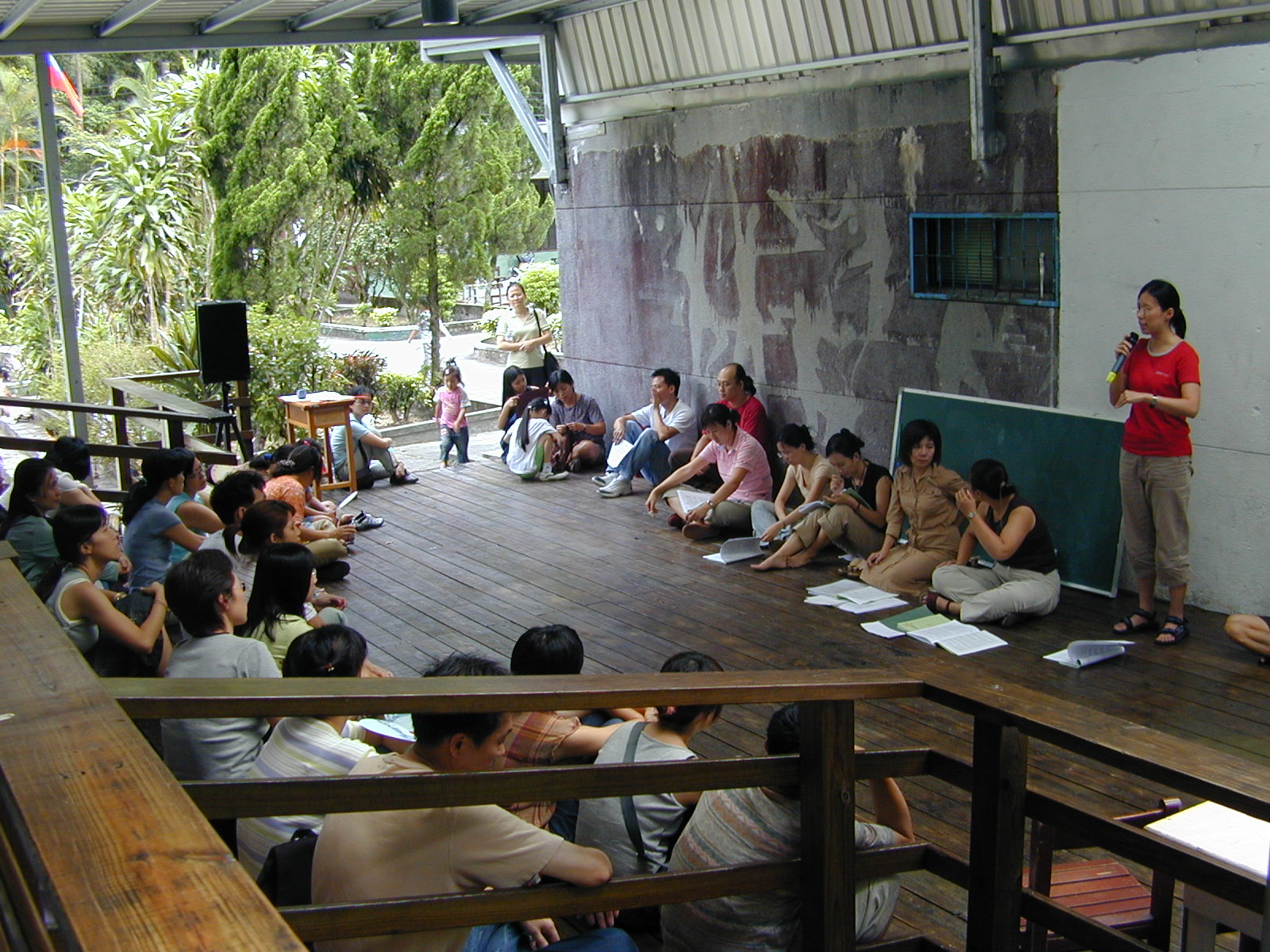 臺北縣烏來鄉信賢村種籽親子實驗小學教師團期初課程報告